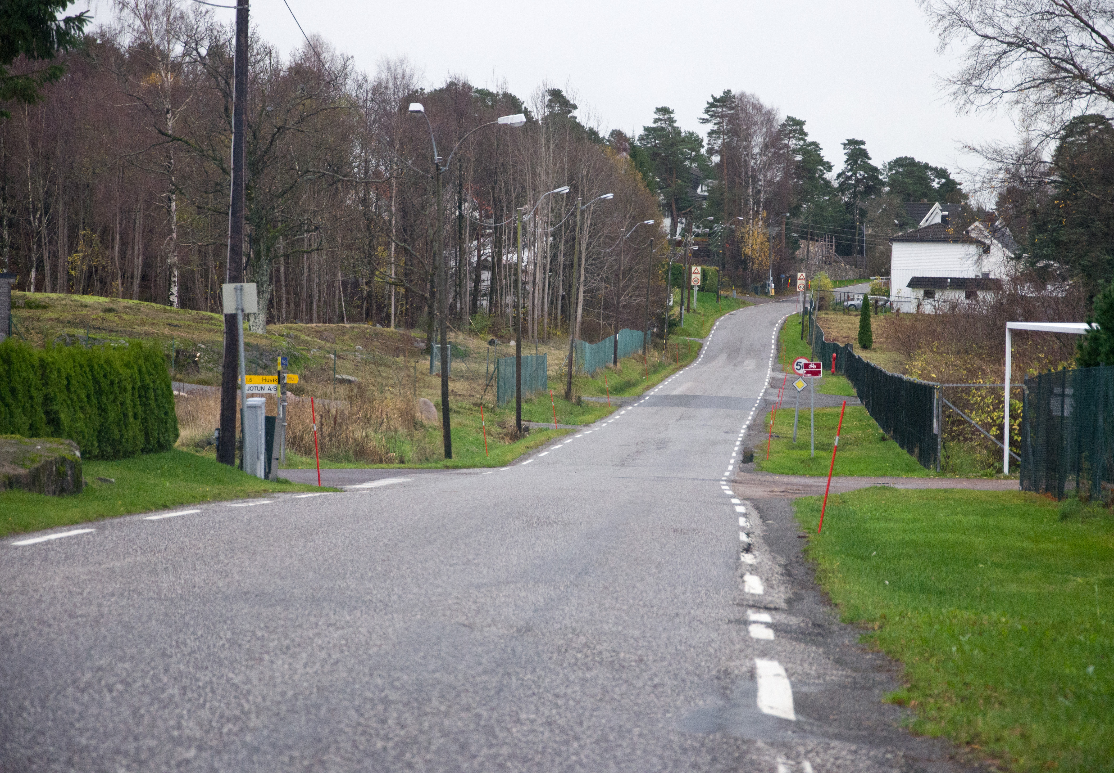 Vestfolds fylkesvei 261 Veløyveien